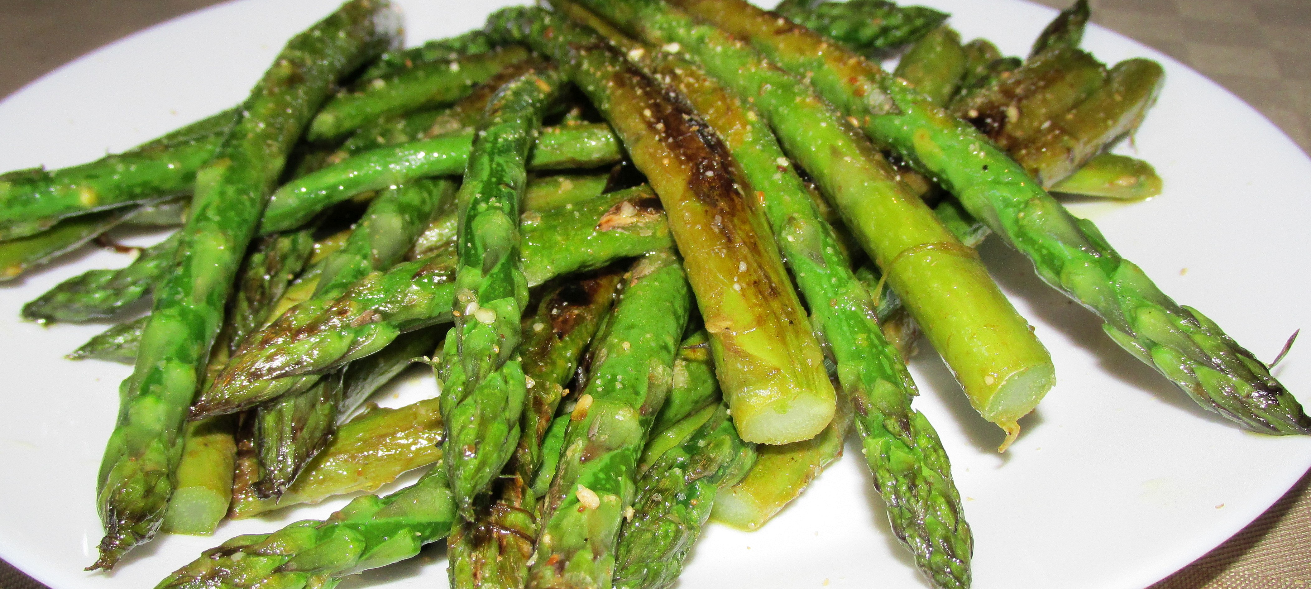 asparagi saltati con gomasio